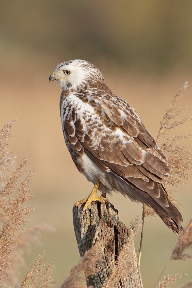 Mäusebussard in der Nähe des Ilkerbruchs